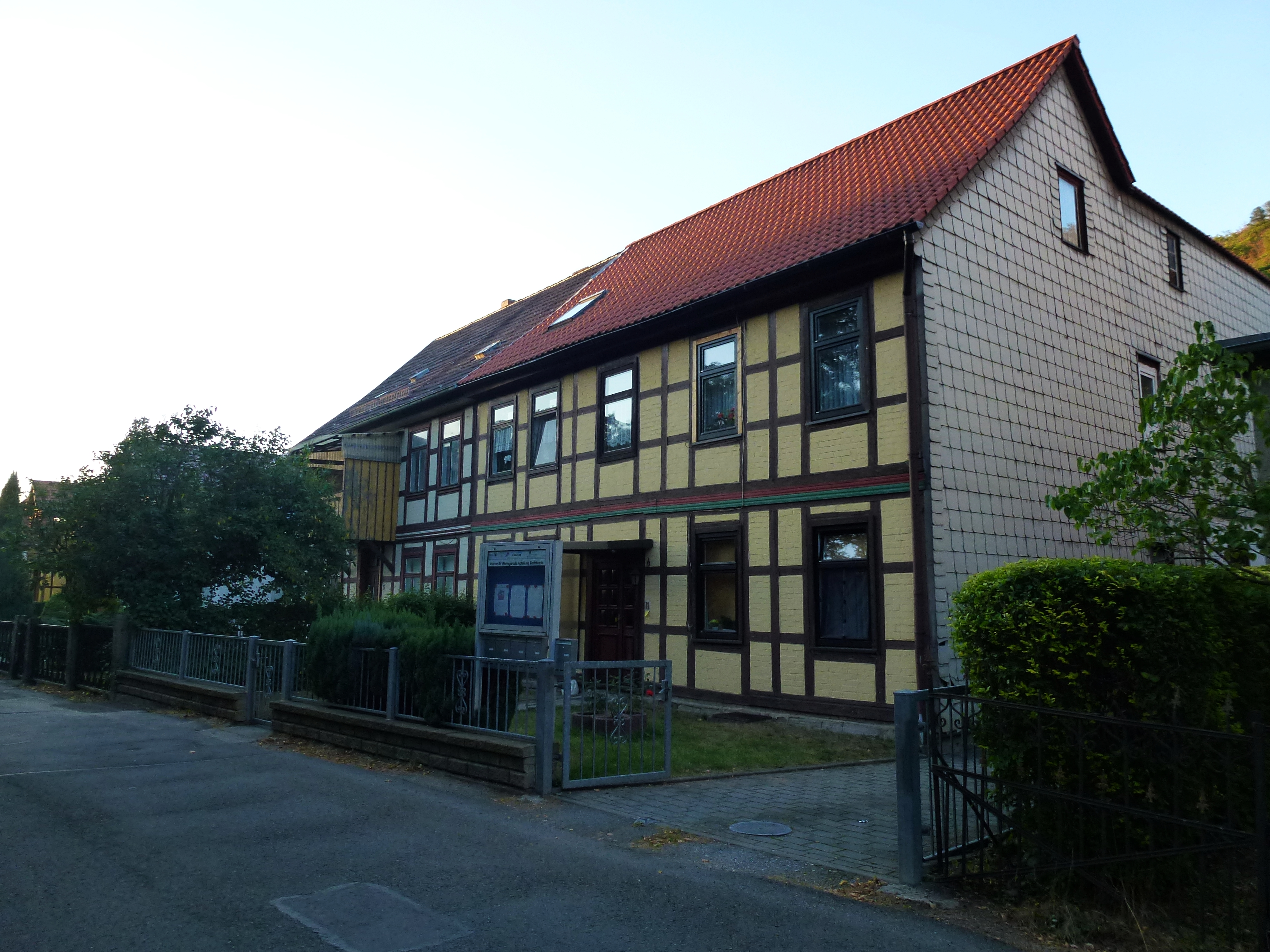 Blick in die Tiergartenstraße in Nöschenrode.